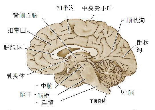 大脑的矢状切面。